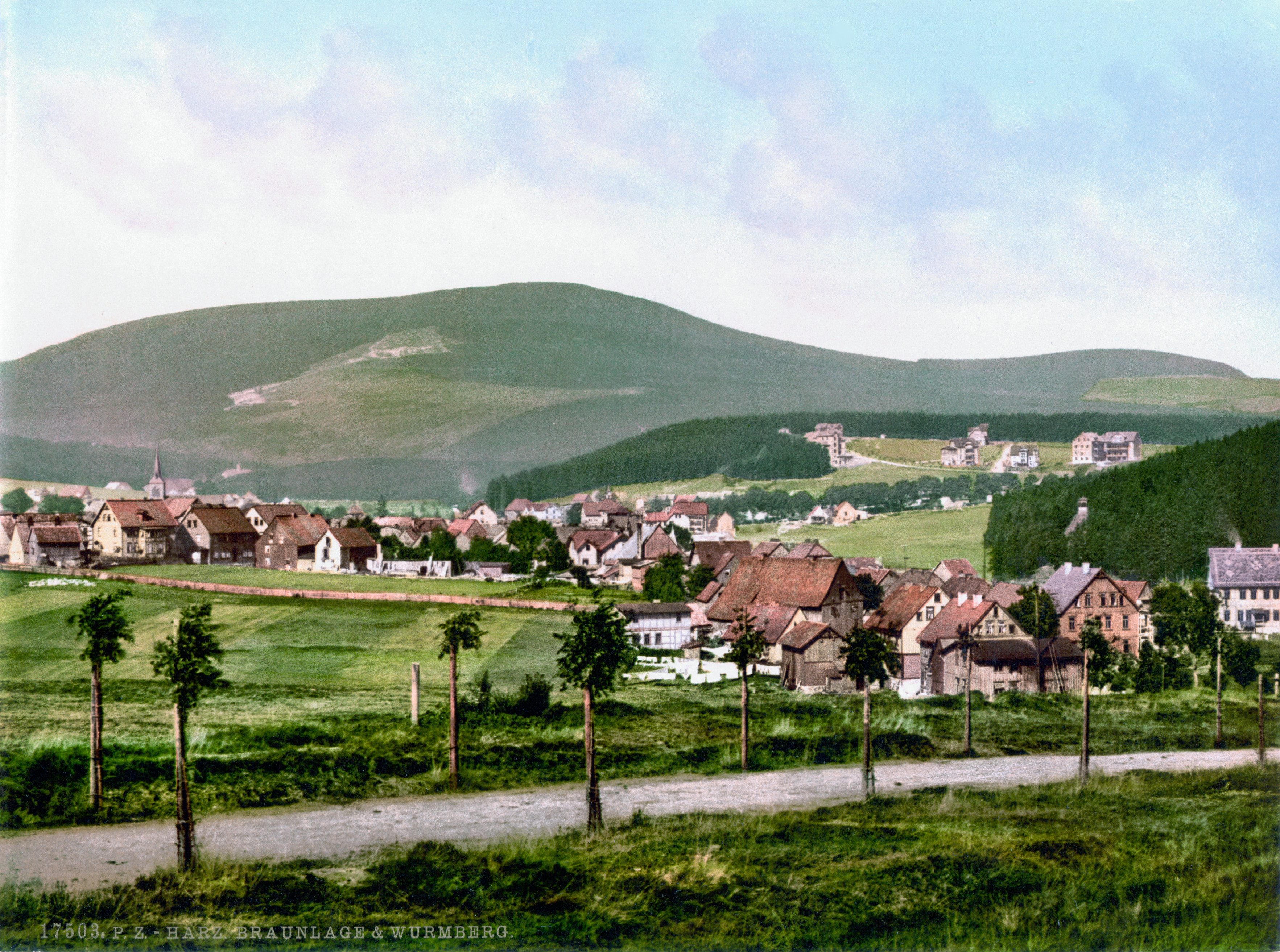 Wurmberg in Braunlage